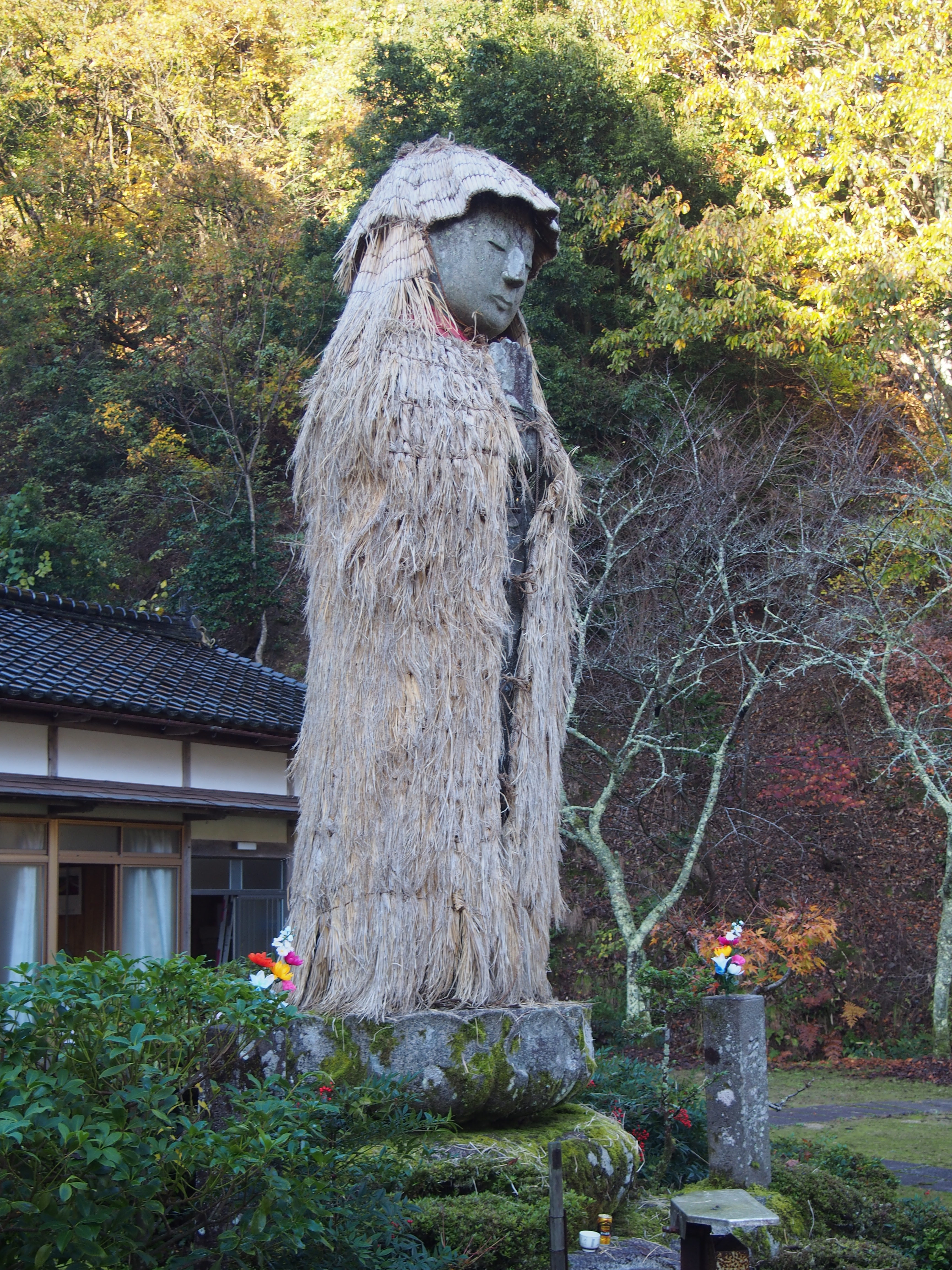 2019年11月23日撮影。この日に地元住民により蓑着せ行事が行われ、この姿のまま冬を越し、春先に取り外される。